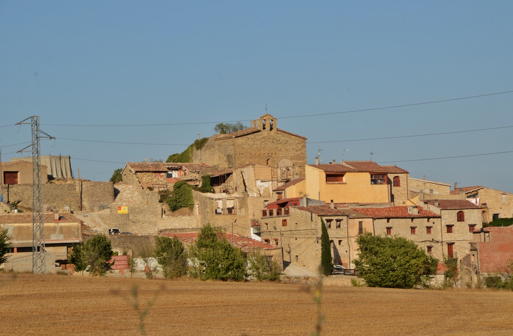 Església de Santa Maria (les Piles)